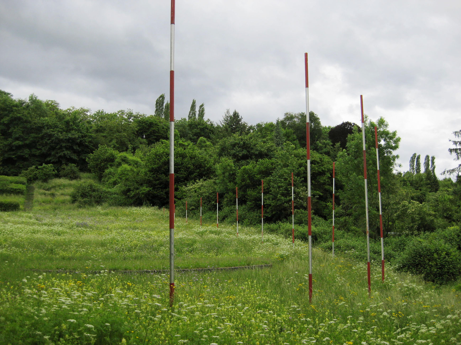 Sculptures in Stuttgart, Killesberg - Gelände der IGA 1993, Hans Dieter Bohnet, Unter den Stangen, 1993